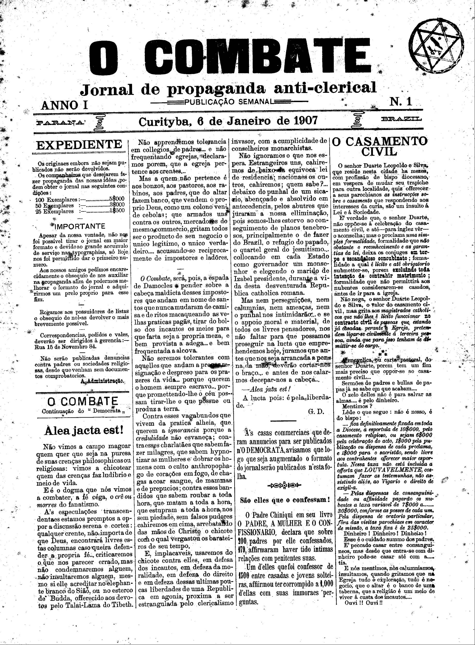 Edição número 1 do jornal anarquista e anti-clerical O Combate, de 1907.